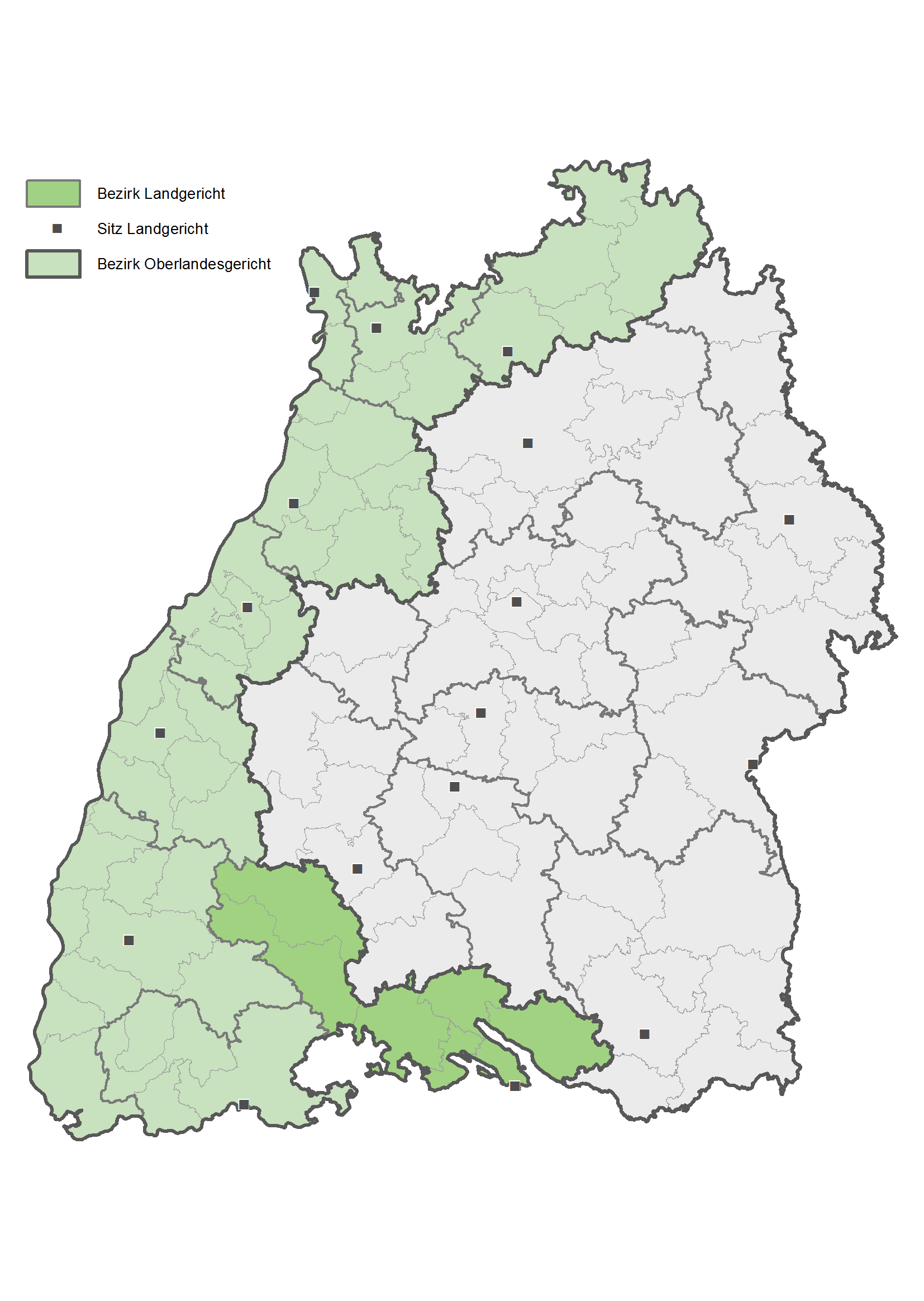 Karte des Bezirks des Landgerichts Konstanz in Baden-Württemberg